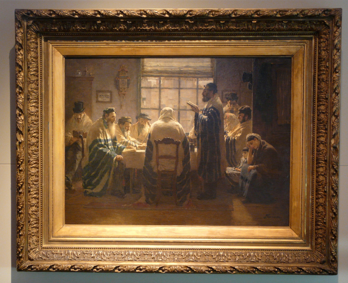 Schilderij Voerman, 1111 Jan Voerman (1857-01-25 - 1941-03-25) doek, hout, olieverf The mourning days, ca. 1884 Interieur met v.l.n.r. vier zittende lezende mannen in talliet gehuld, een figuur op de rug gezien, een staande voorlezer naar links gewend in talliet, twee mannen, twee vrouwen en een kind; het geheel om een tafel voor een raam, geheel rechts open deur. foto gemaakt tijdens WLANL foto workshop op 1 juni in het Joods Historisch Museum, Amsterdam